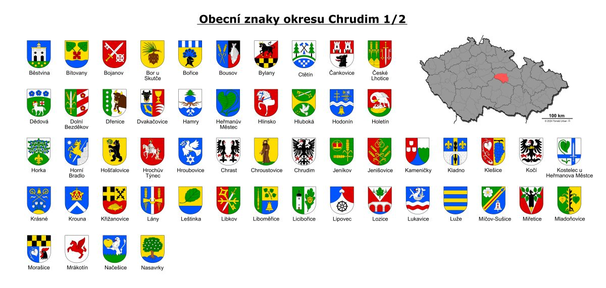 Přehled znaků okresu Chrudim